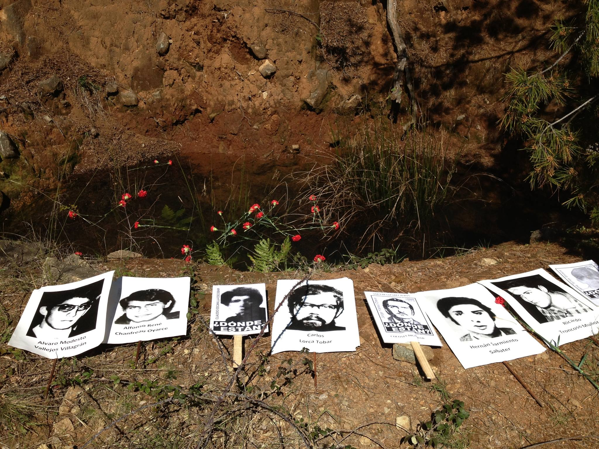 La fosa en que la justicia constató que fueron inhumados y exhumados los cuerpos de los detenidos desaparecidos que fueron asesinados en Colonia Dignidad.